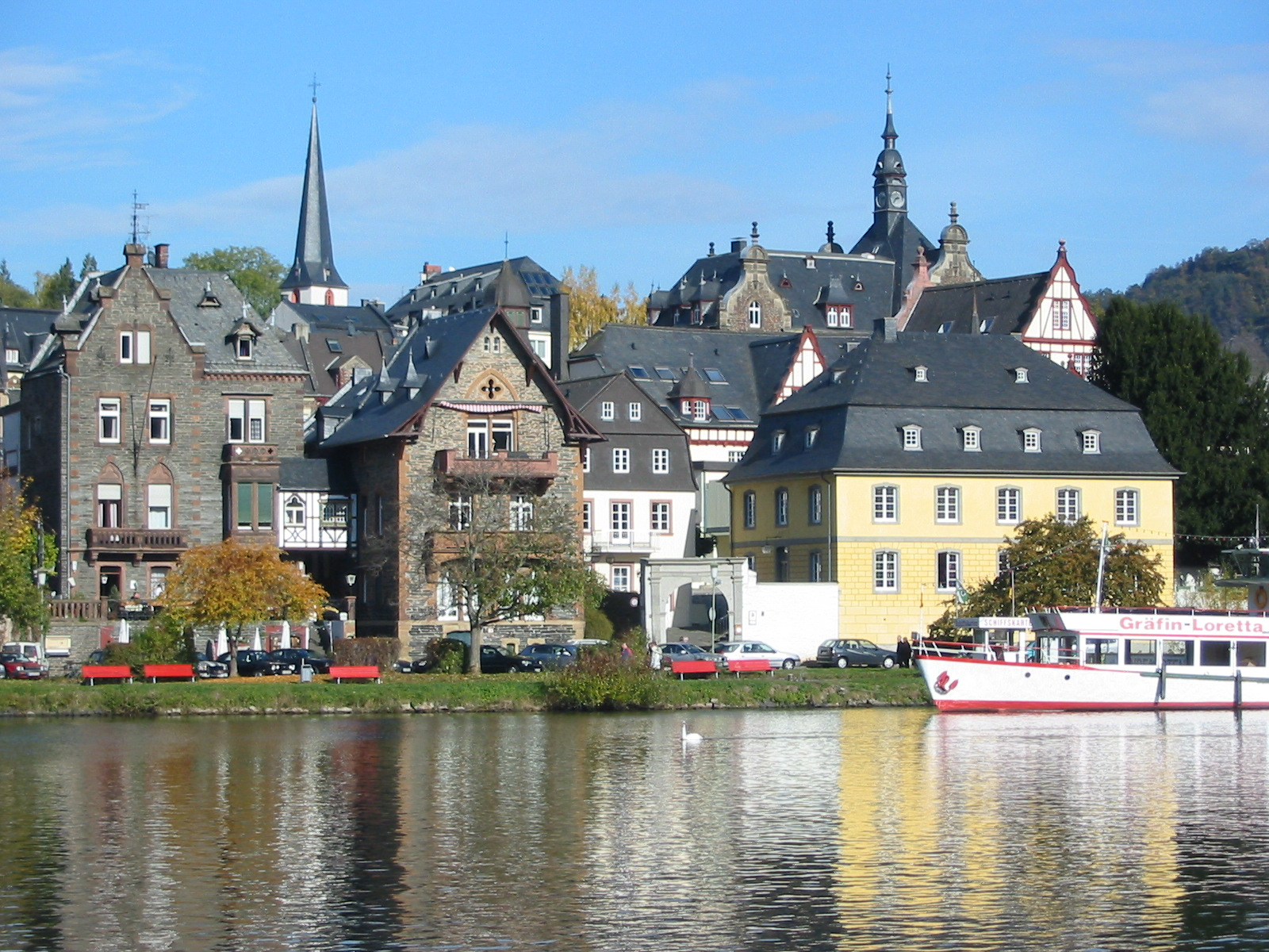 Blick auf Traben-Trarbach